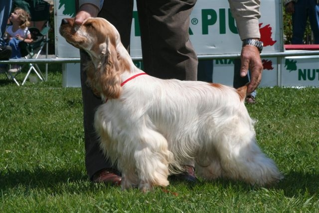 Gessa d'Aran Copo de Nieve, cocker arancio roano